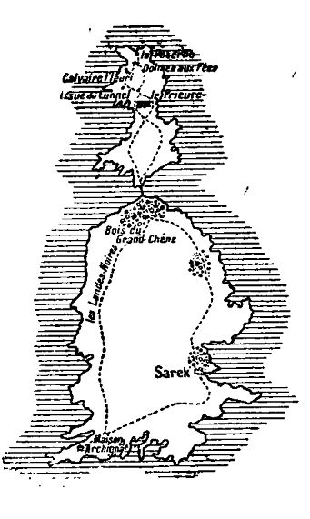 Maurice Leblanc (1864 – 1941) - L’Île aux trente cercueils (1919)